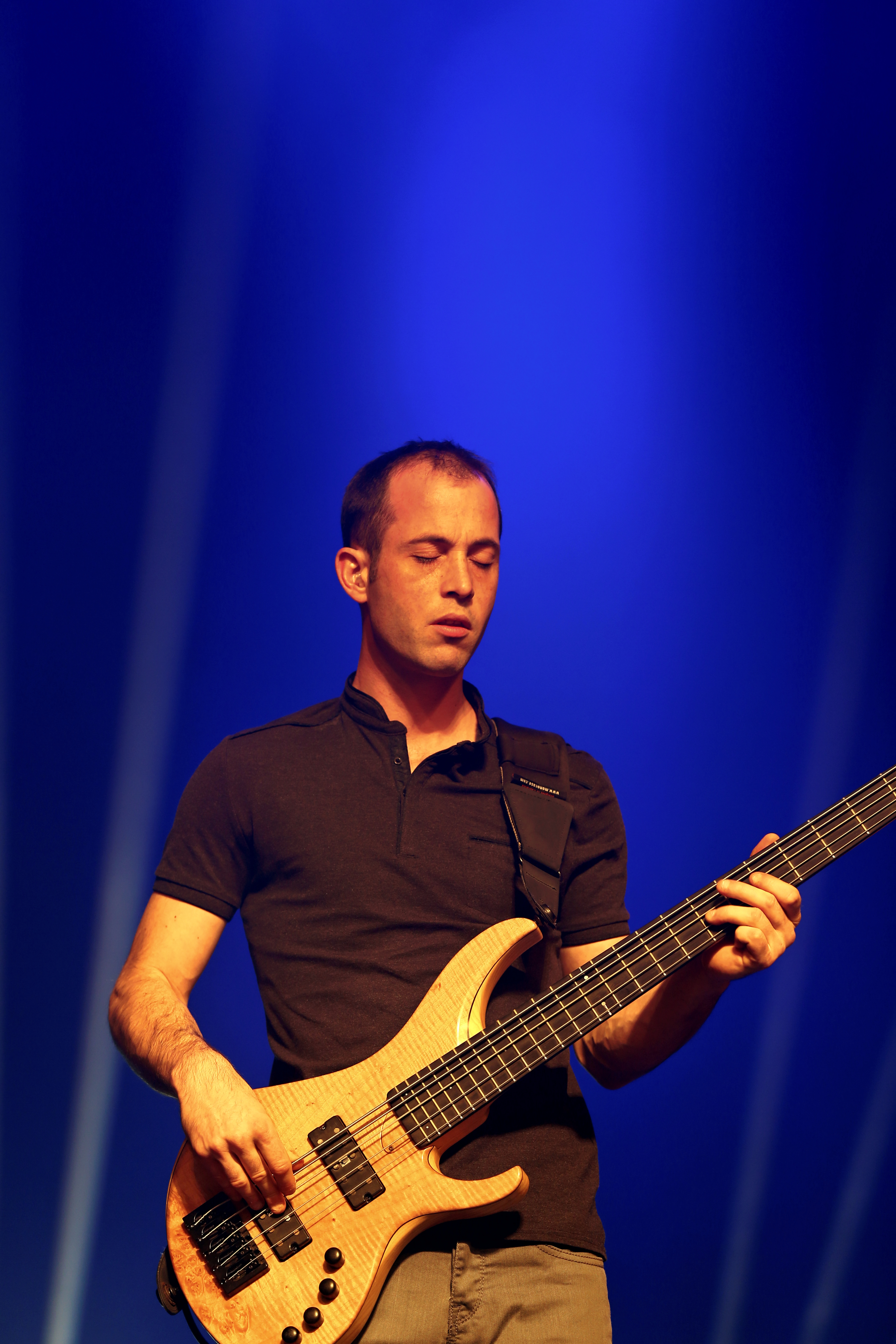 Startijenn en fest-noz lors du festival Yaouank le 21 novembre 2015 au Parc des Expositions de Rennes.